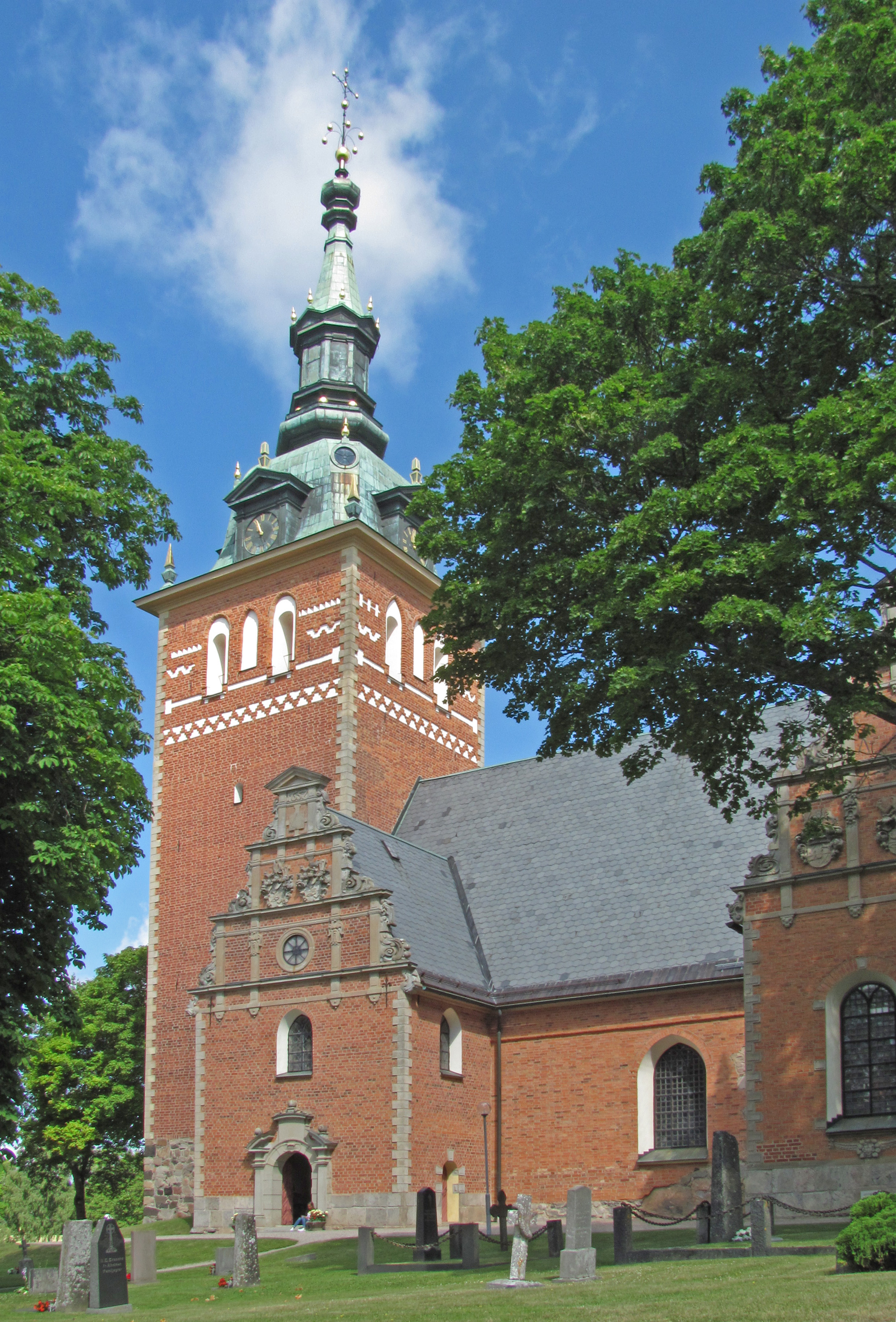 Jäders kyrka